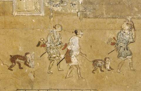 洛中洛外図屏風、狩野元信、1520年代